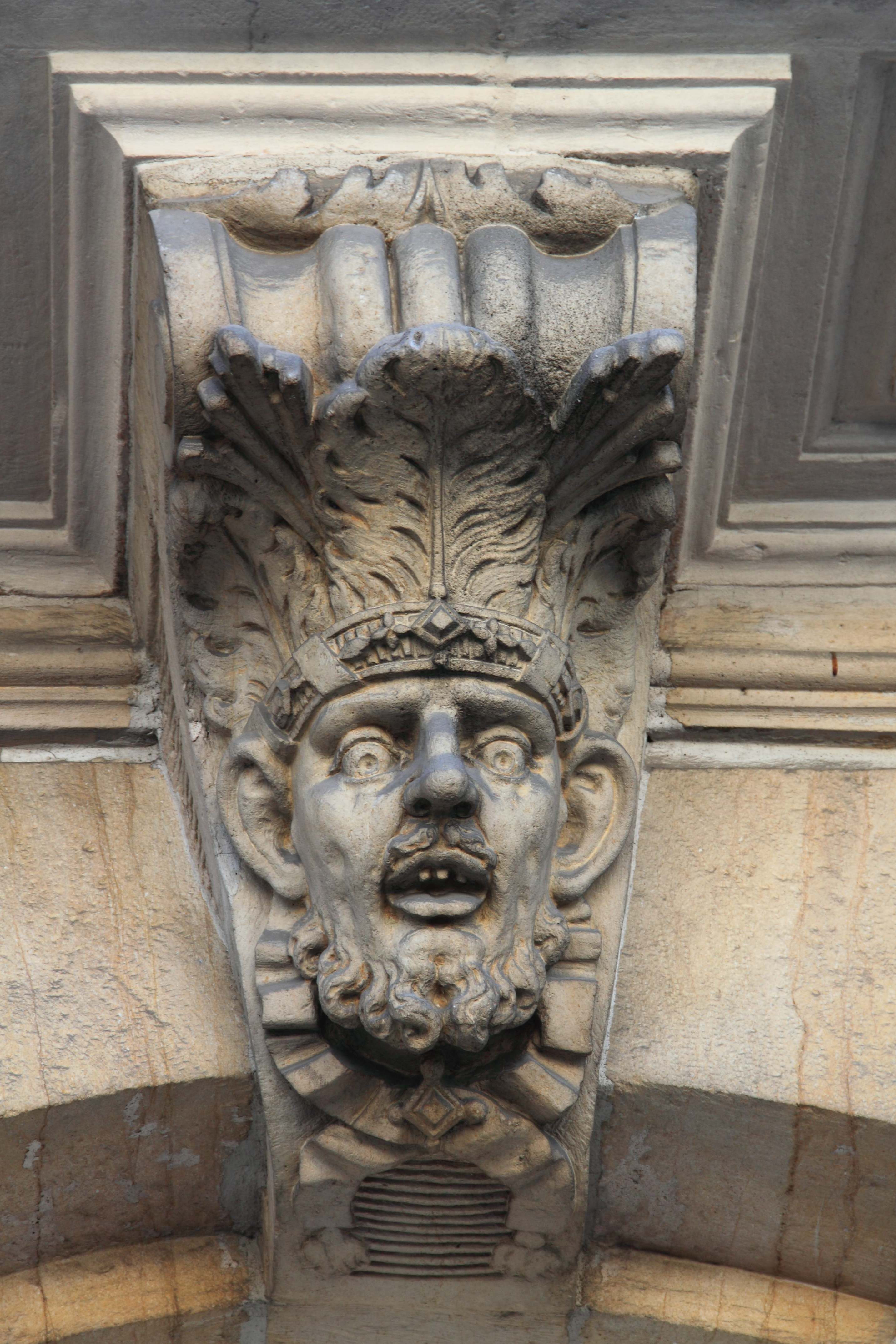 Mascaron sur la Bourse des marchands de Nancy (maintenant Tribunal de Commerce).